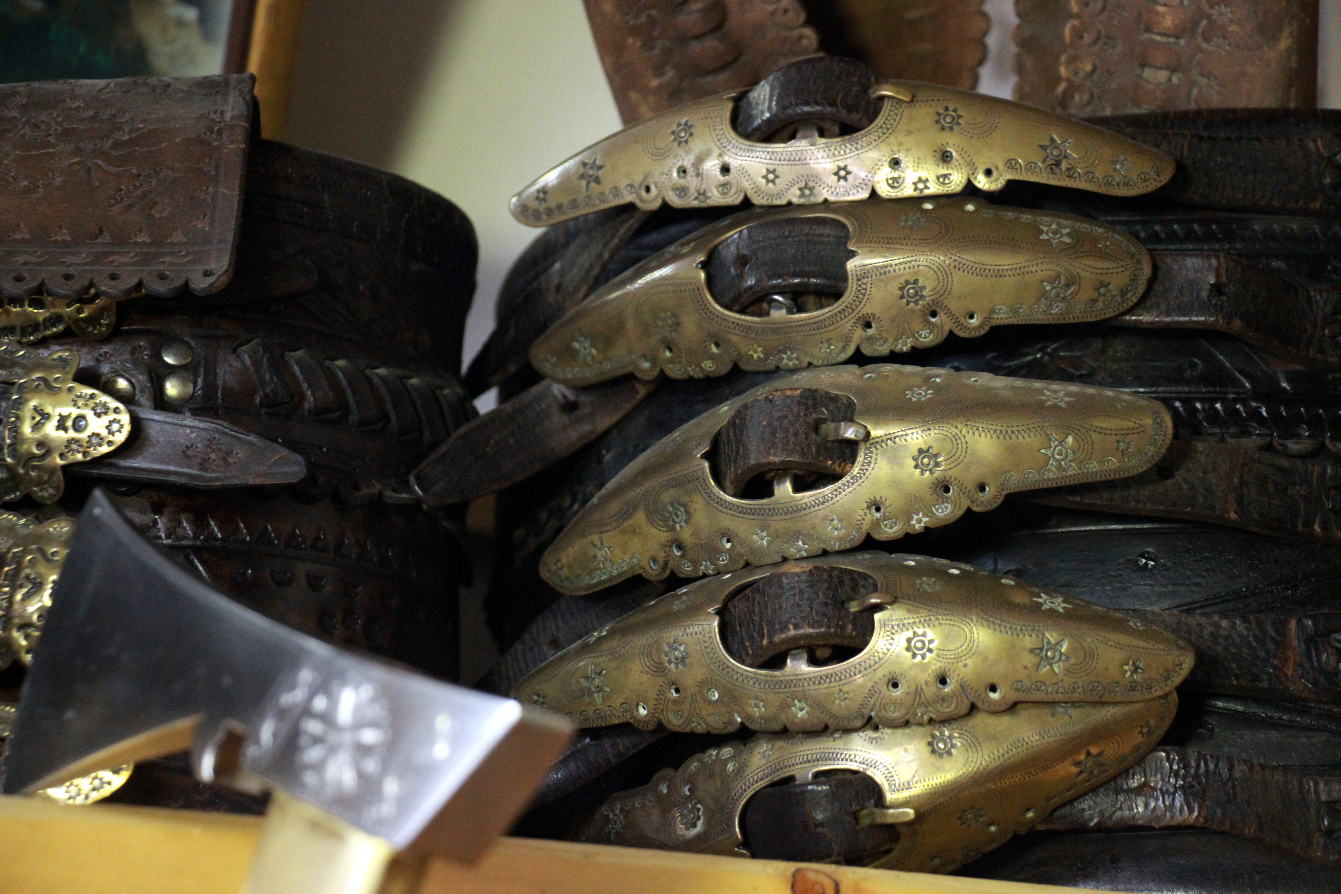 Sprzączki i pasy wykonane przez Ľubomíra Páričkę. Martin, Słowacja